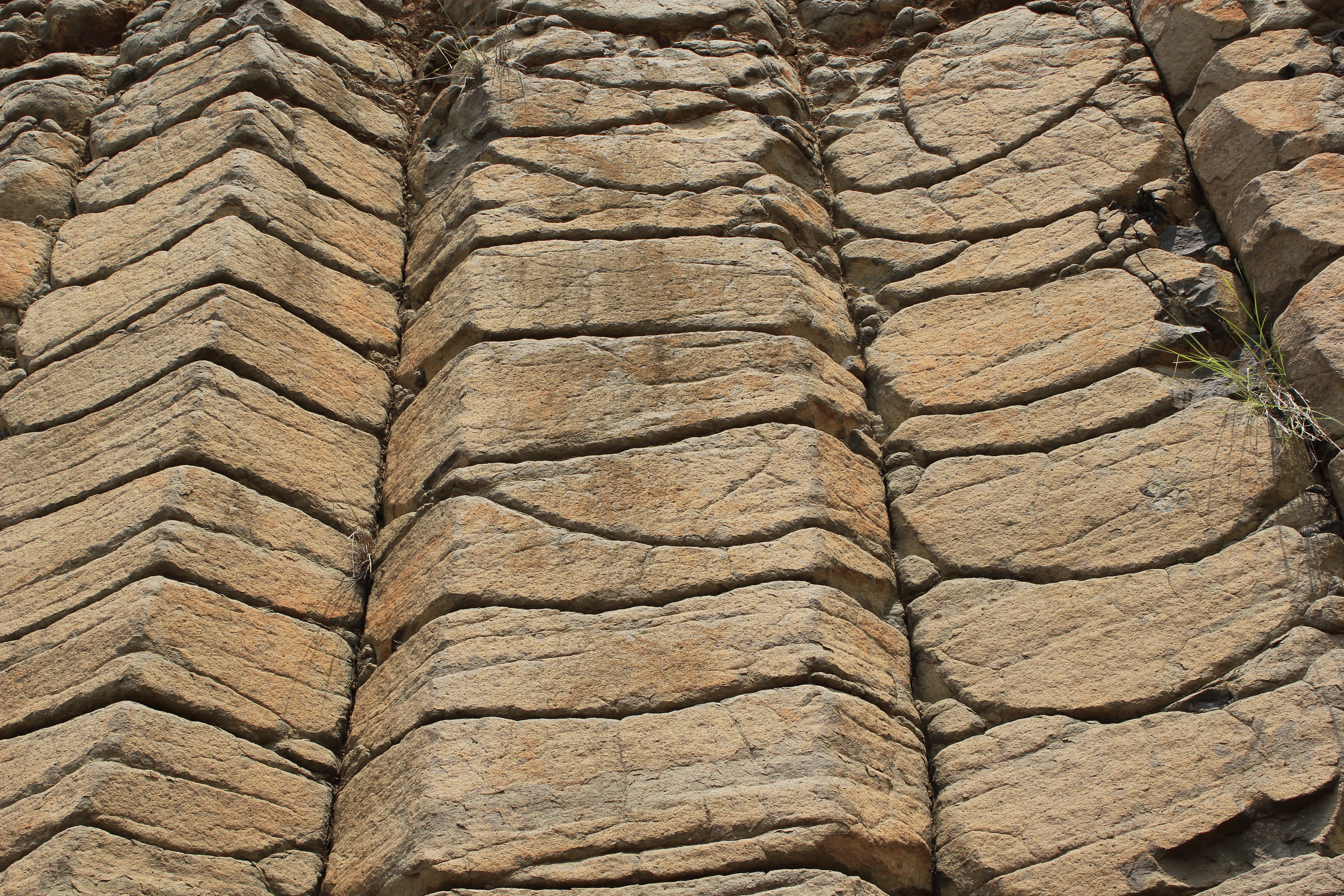 中文（台灣）